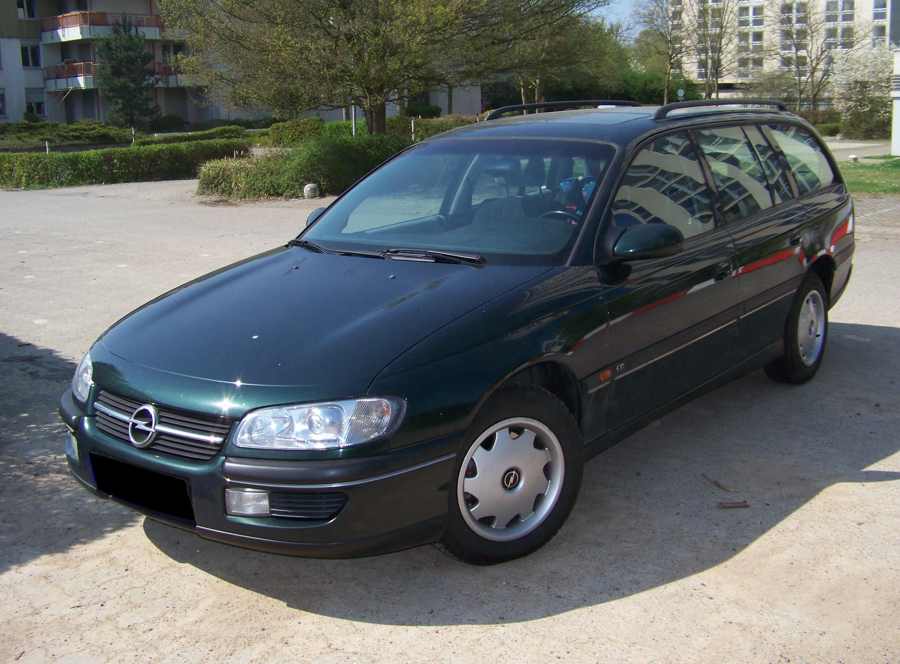 Opel Omega B Caravan